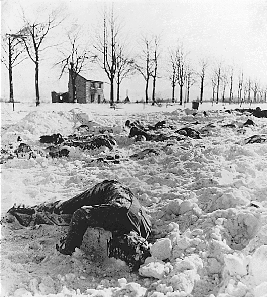 Les corps de prisonniers de guerre américains massacrés par des Waffen SS sont découverts le 14 janvier 1945.